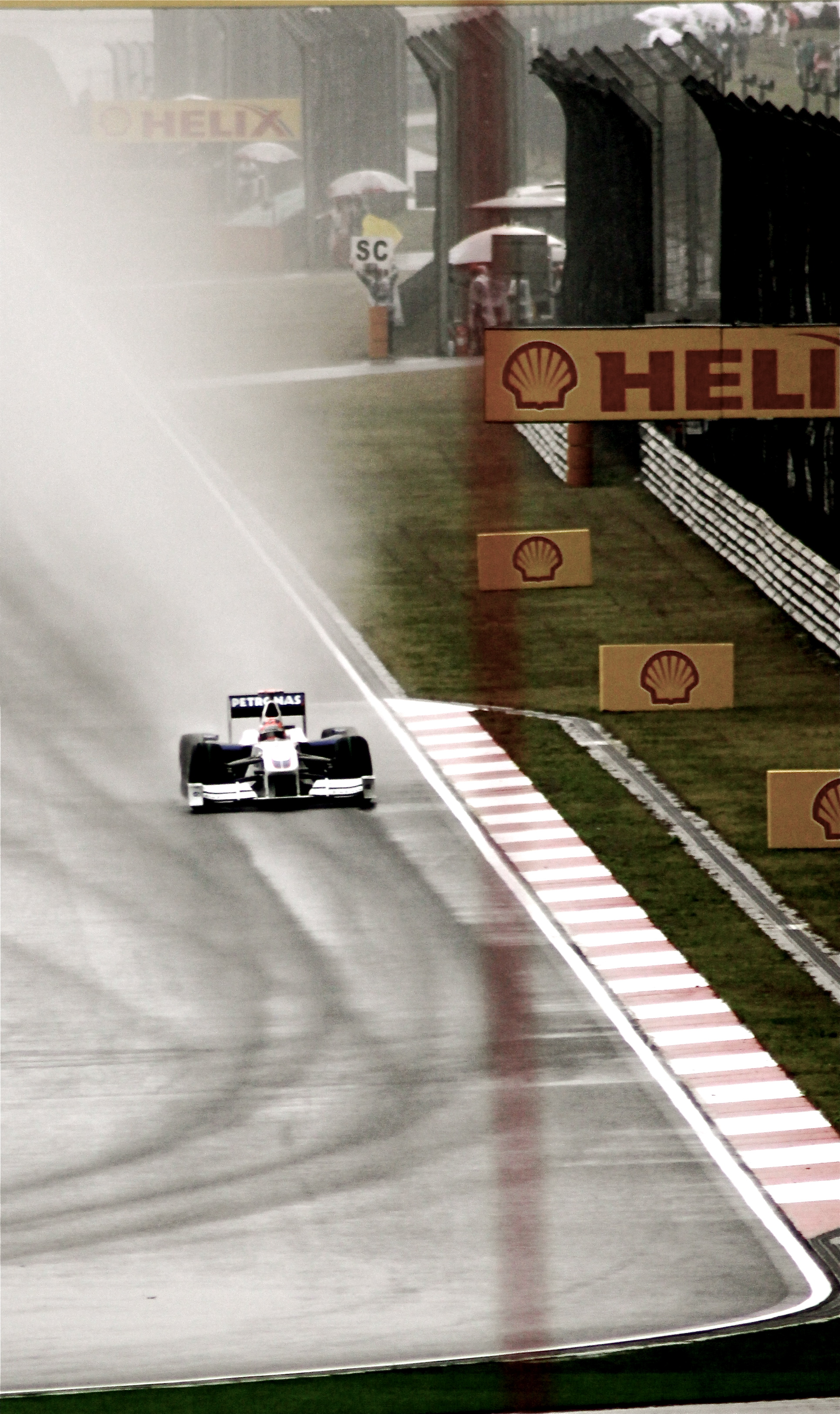 Kubica China 09